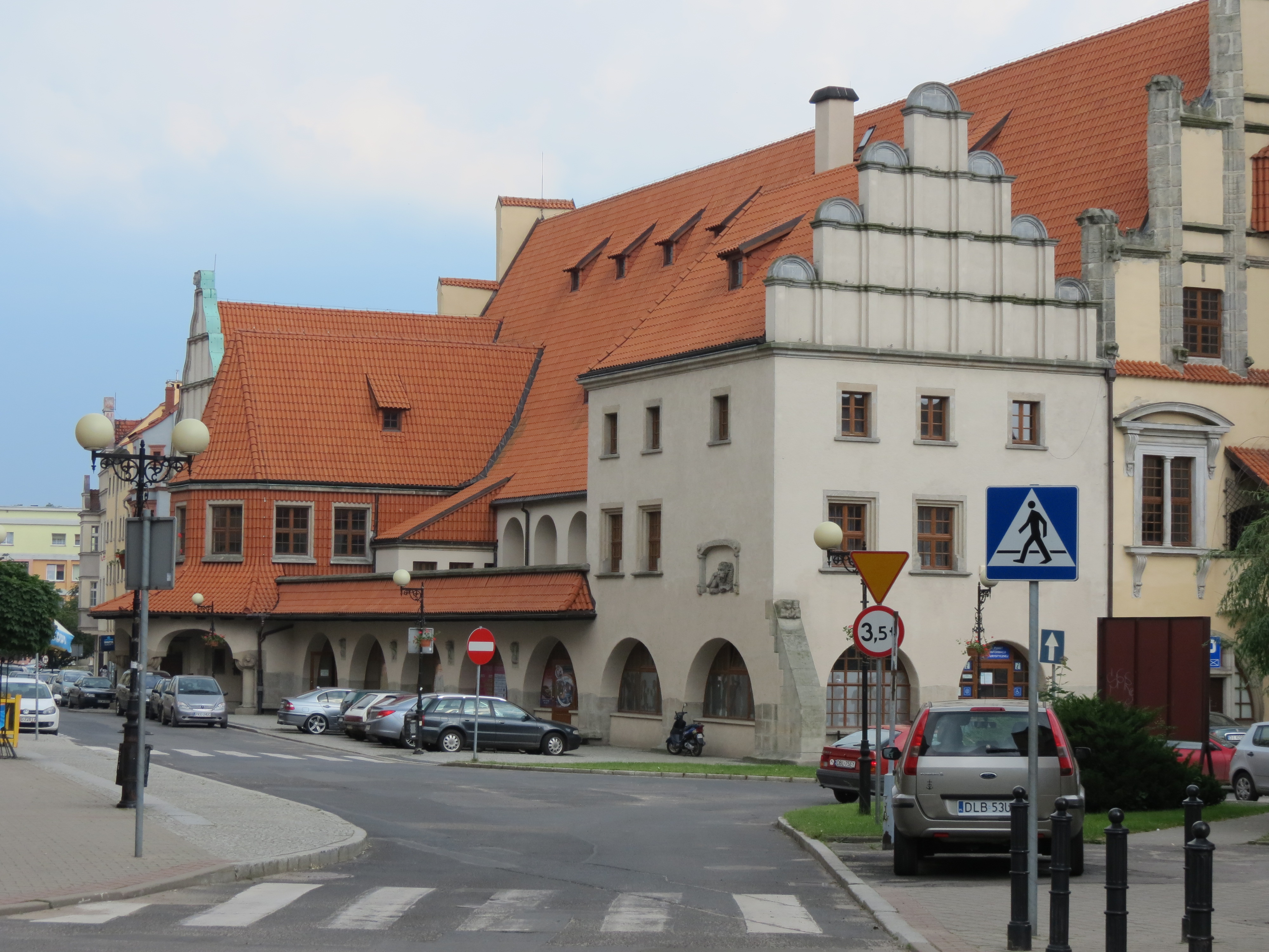 Lwówek Śląski, ratusz, 1522, 1545, 1905